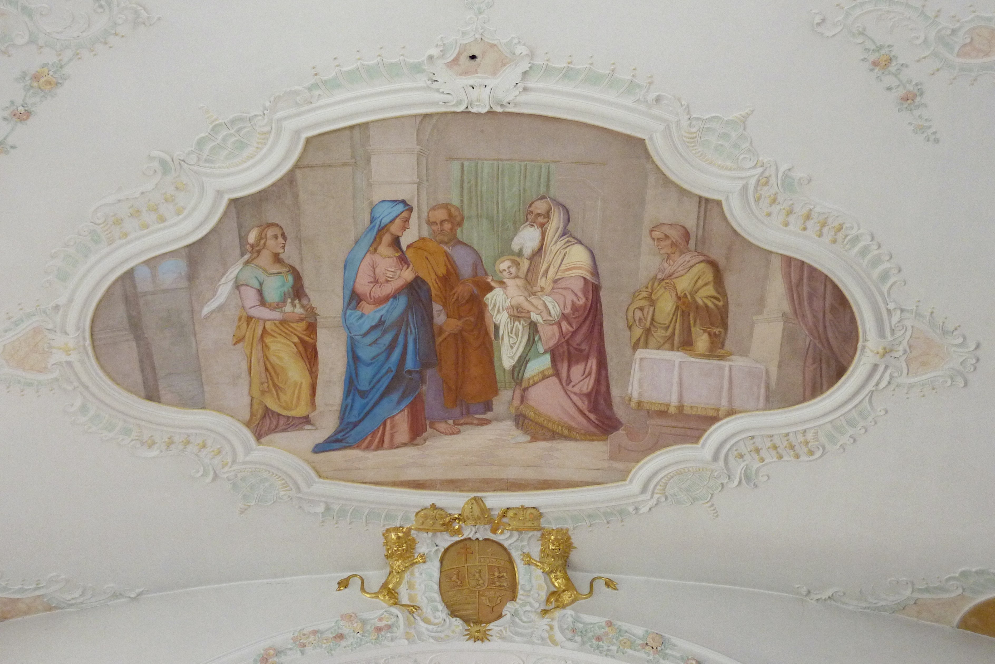 Katholische Pfarrkirche St. Blasius in Fristingen, einem Stadtteil von Dillingen an der Donau im Landkreis Dillingen an der Donau (Bayern), Deckenmalerei im Langhaus, Darstellung: Präsentation Jesu im Tempel; Stuckkartusche mit dem Wappen des Fürstbischofs von Augsburg Joseph Ignaz Philipp von Hessen-Darmstadt